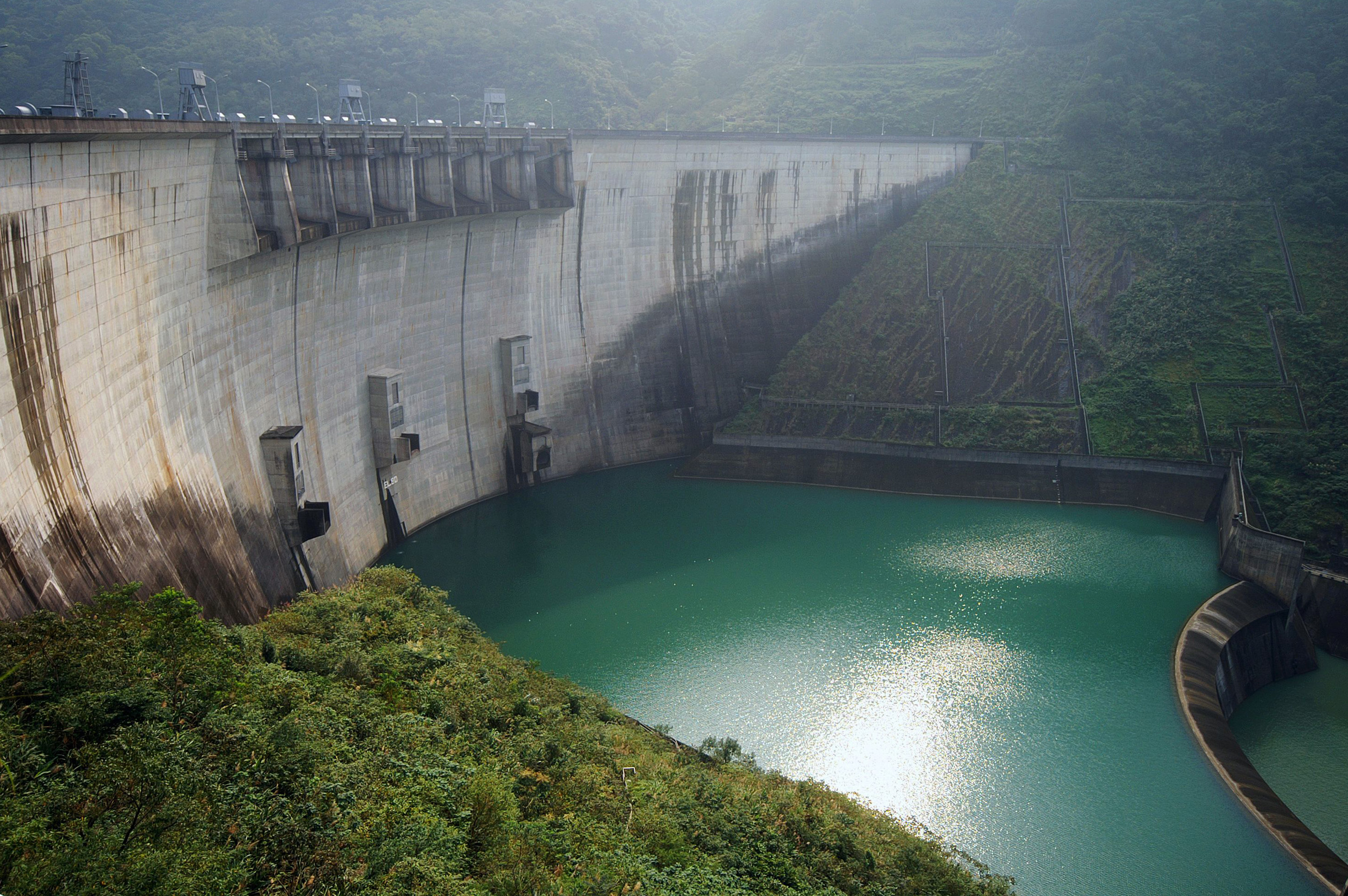 翡翠水庫 Fei Cuei Reservoir,Taipei,TAiwan